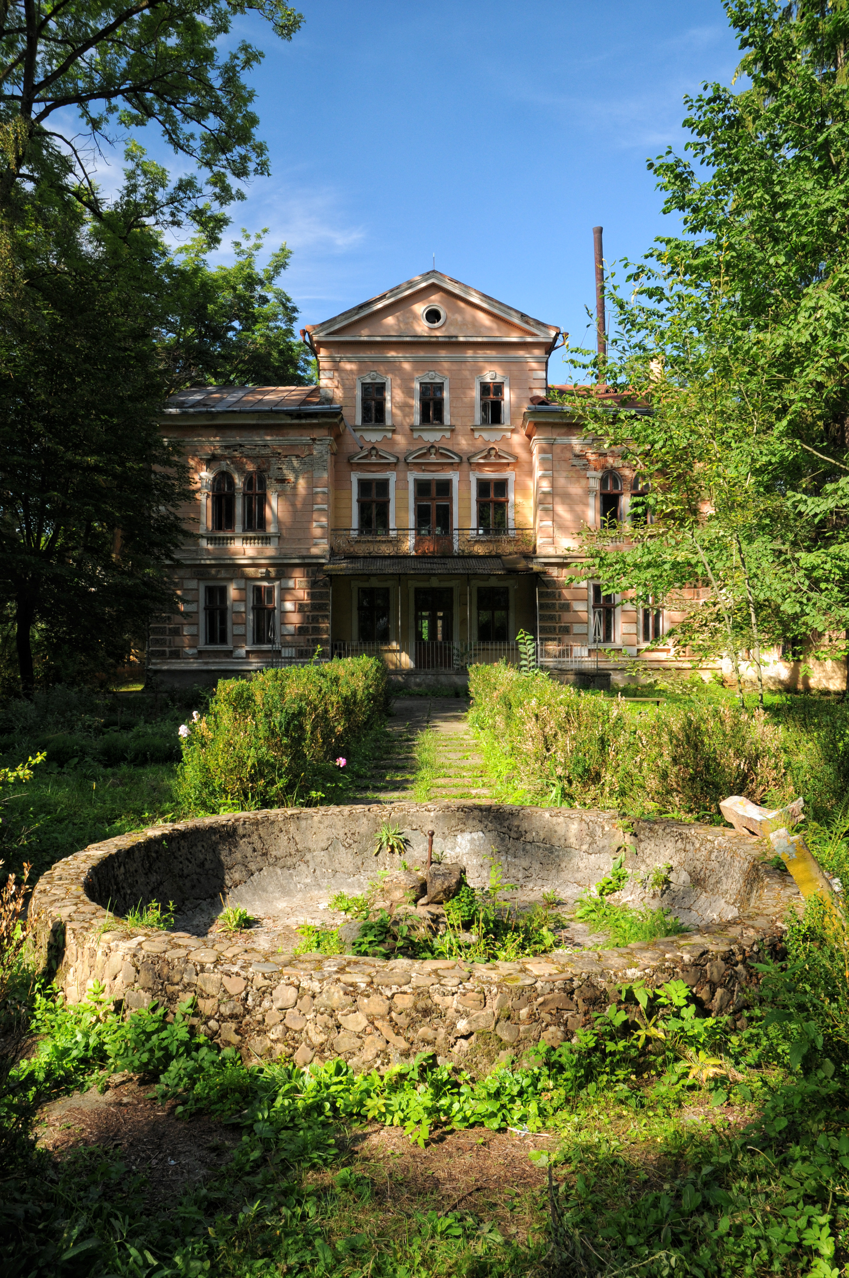 Conacul (astăzi, sanatoriu pentru copii) din Jadova, raionul Storojineț, regiunea Cernăuți, Ucraina